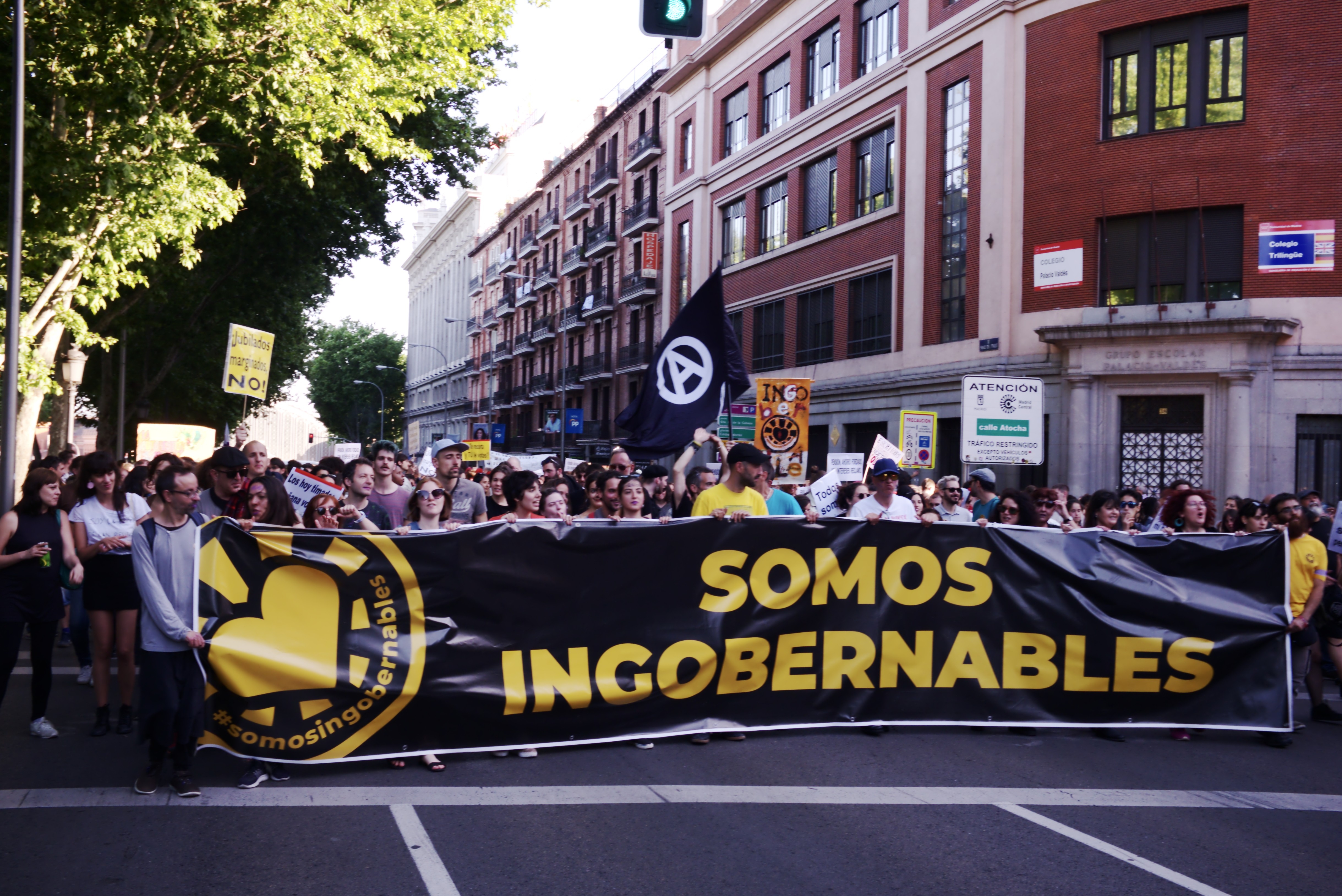 La Ingobernable sale a la calle a defenderse “gobierne quien gobierne”